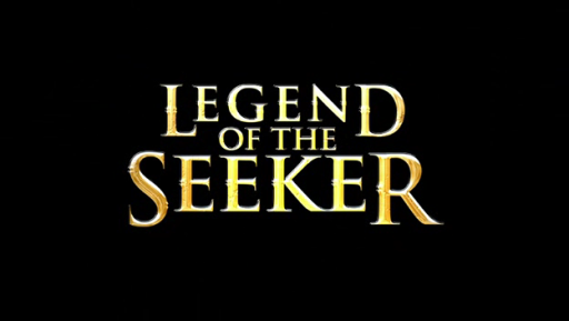 Logo der Serie Legend of the Seeker